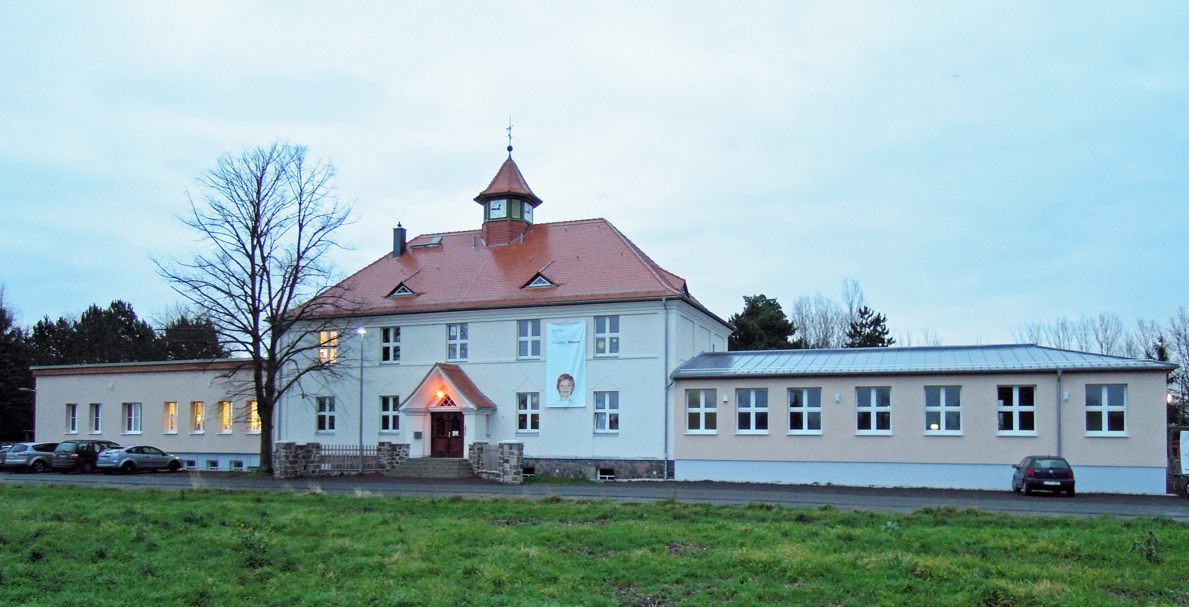 Lebenswelt Grundschule in Döhlen (Zwenkau) 2014